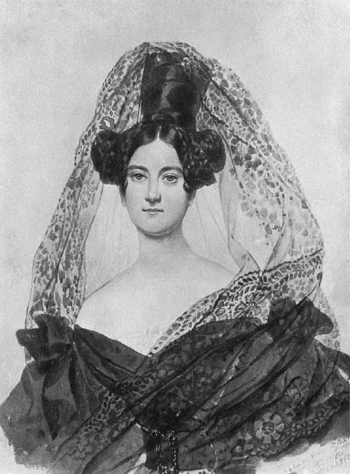 Прасковья Егоровна Хитрово